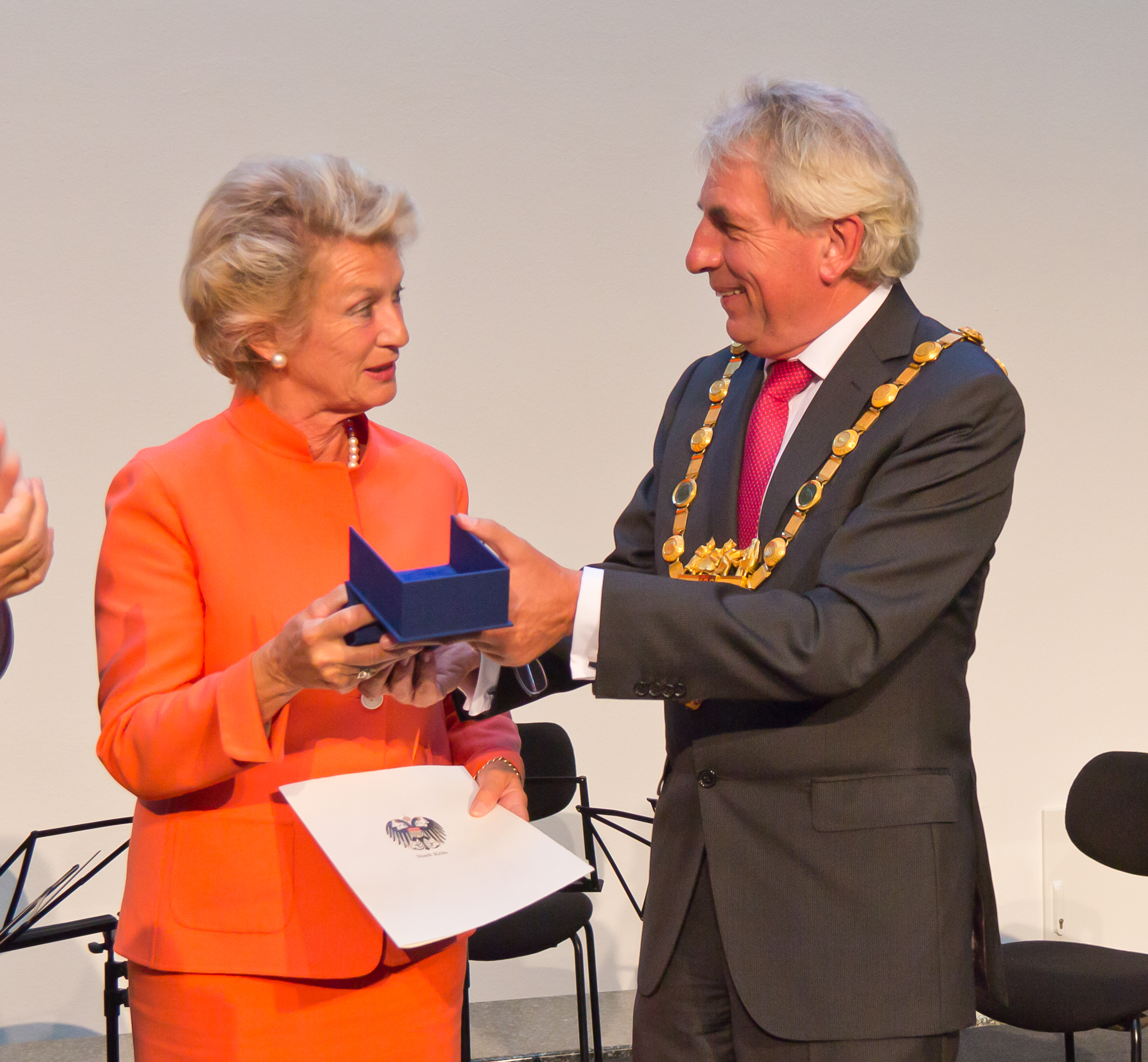 Preisverleihung des Konrad-Adenauer-Preises 2012 an Petra Roth, Oberbürgermeisterin der Stadt Frankfurt am Main 1995-2012. Foto: Überreichung des Preises durch Köln Oberbürgermeister Jürgen Roters an die Preisträgerin Petra Roth.